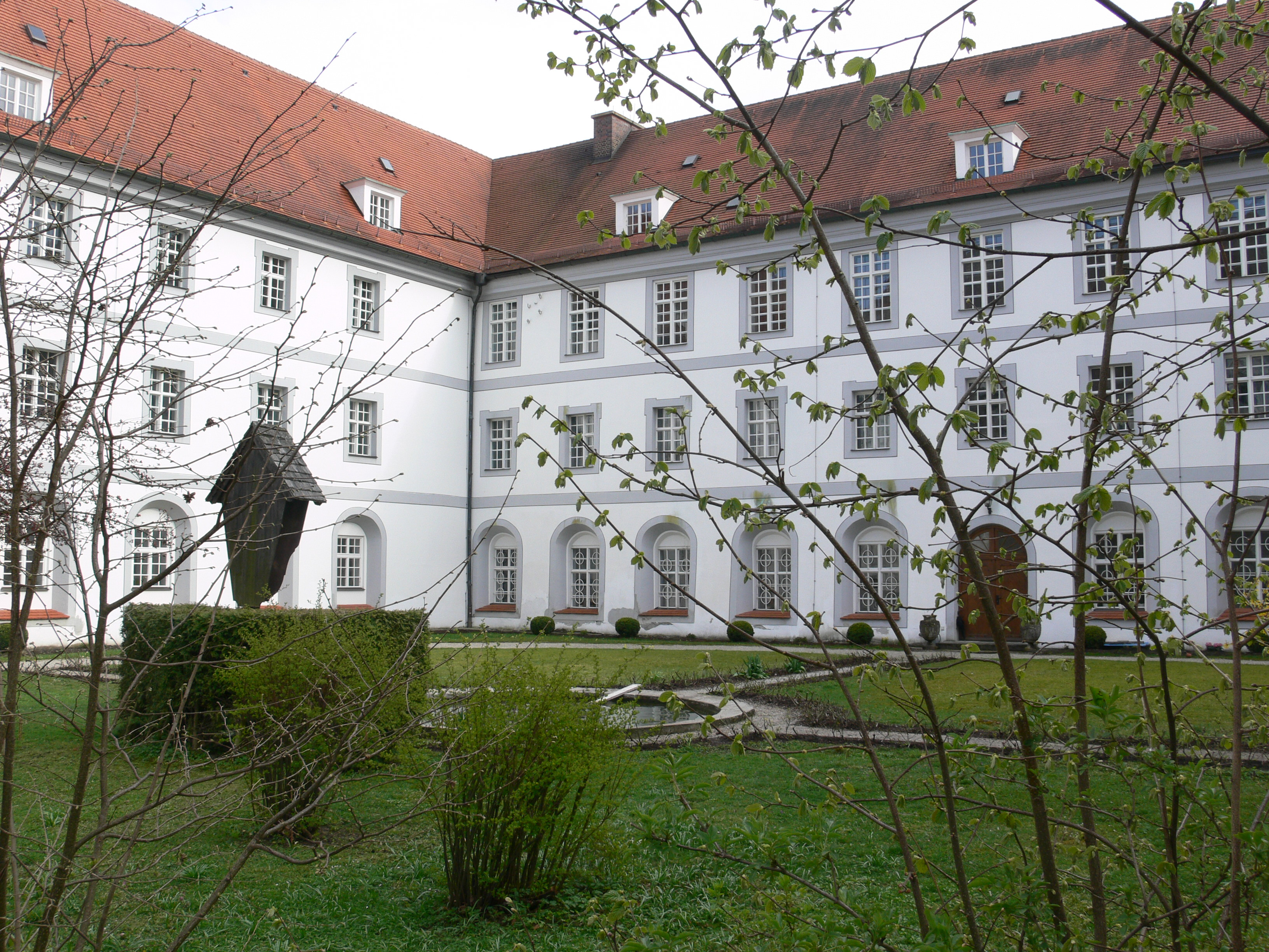 Ehemaliges Augustiner-Chorherrenstift, Dießen am Ammersee, Innenhof